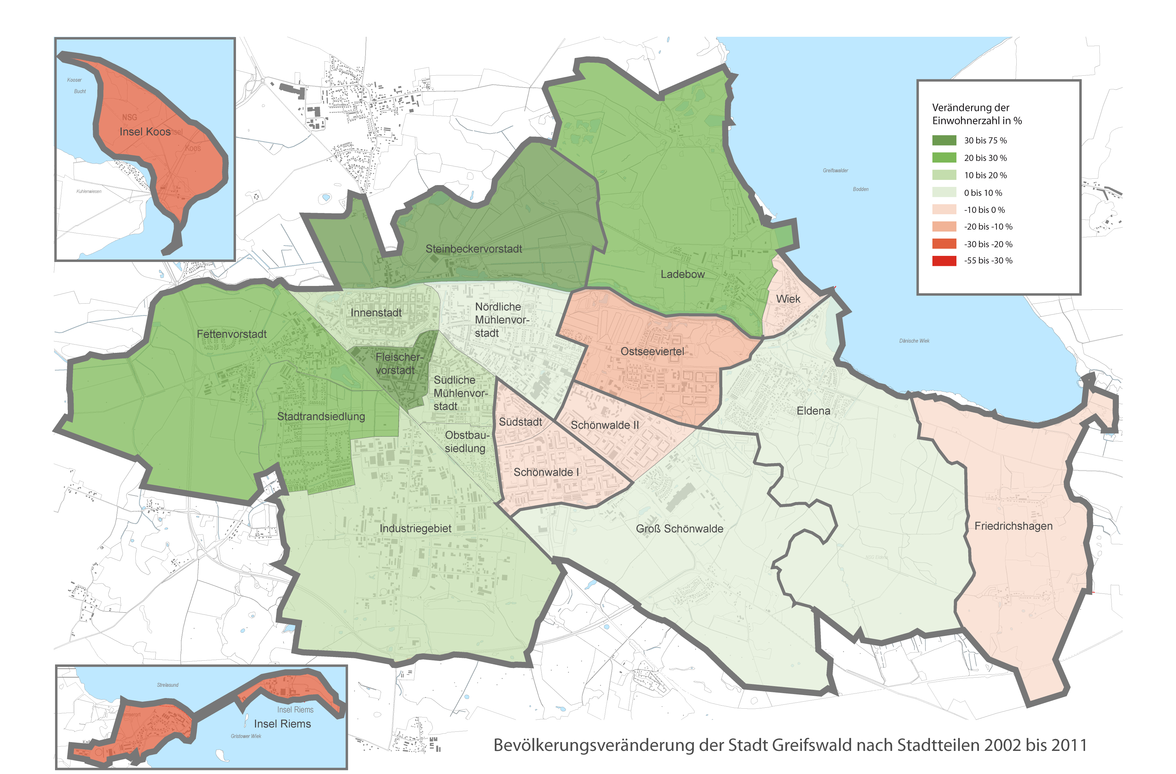 Veränderung der Einwohnerzahl der Stadt Greifswald nach Stadtteilen 2002 bis 2011